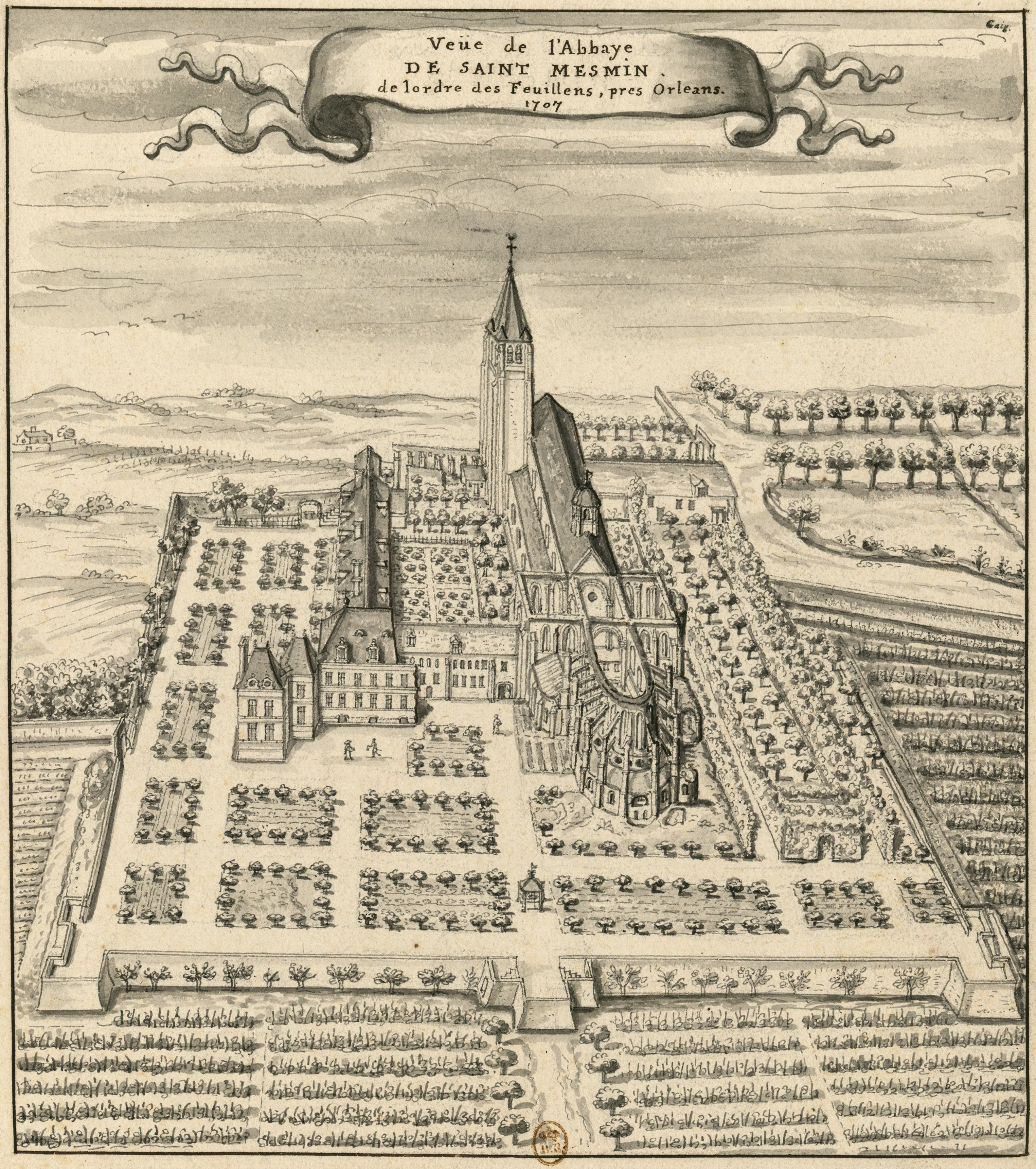 Vue de l'abbaye Saint-Mesmin de l'ordre des Feuillens près Orléans, 1707, dessin par Louis Boudan